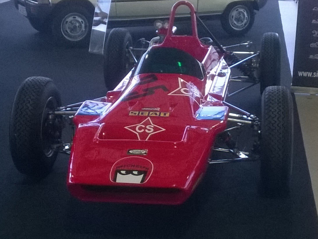 Classicauto 2016 SEAT Formula 1430